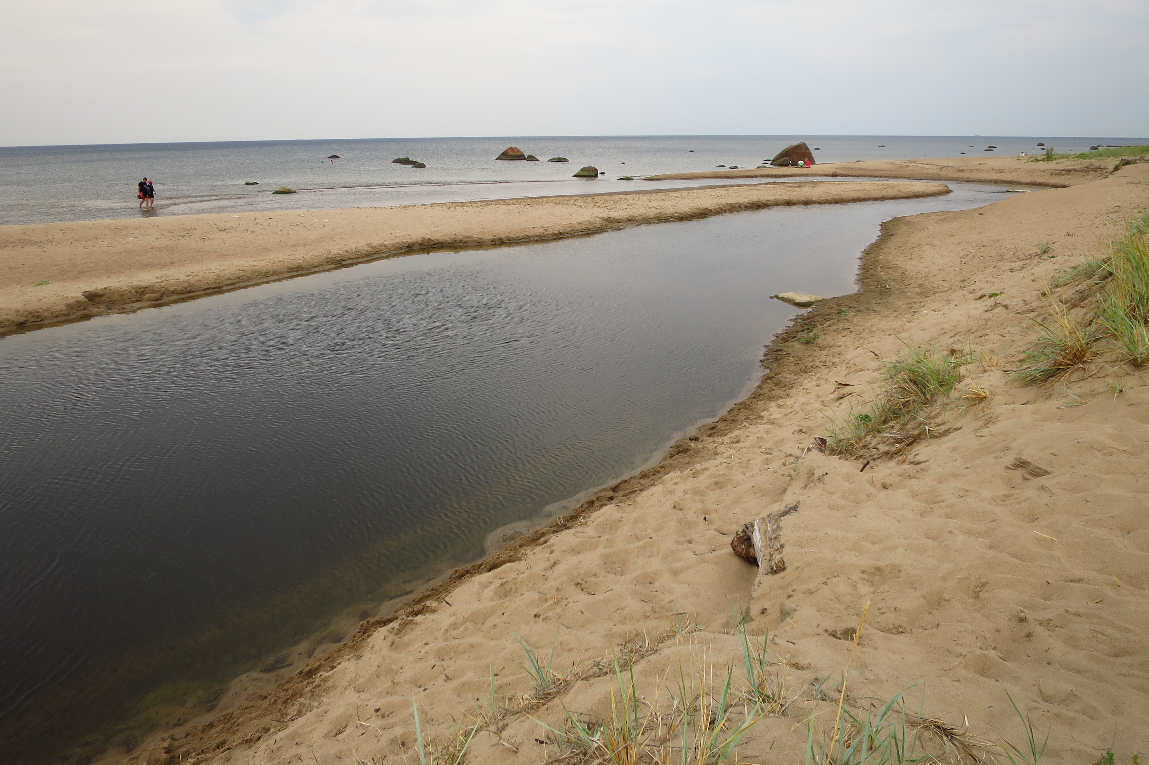 Selja jõe suue Selja jõe MKAl